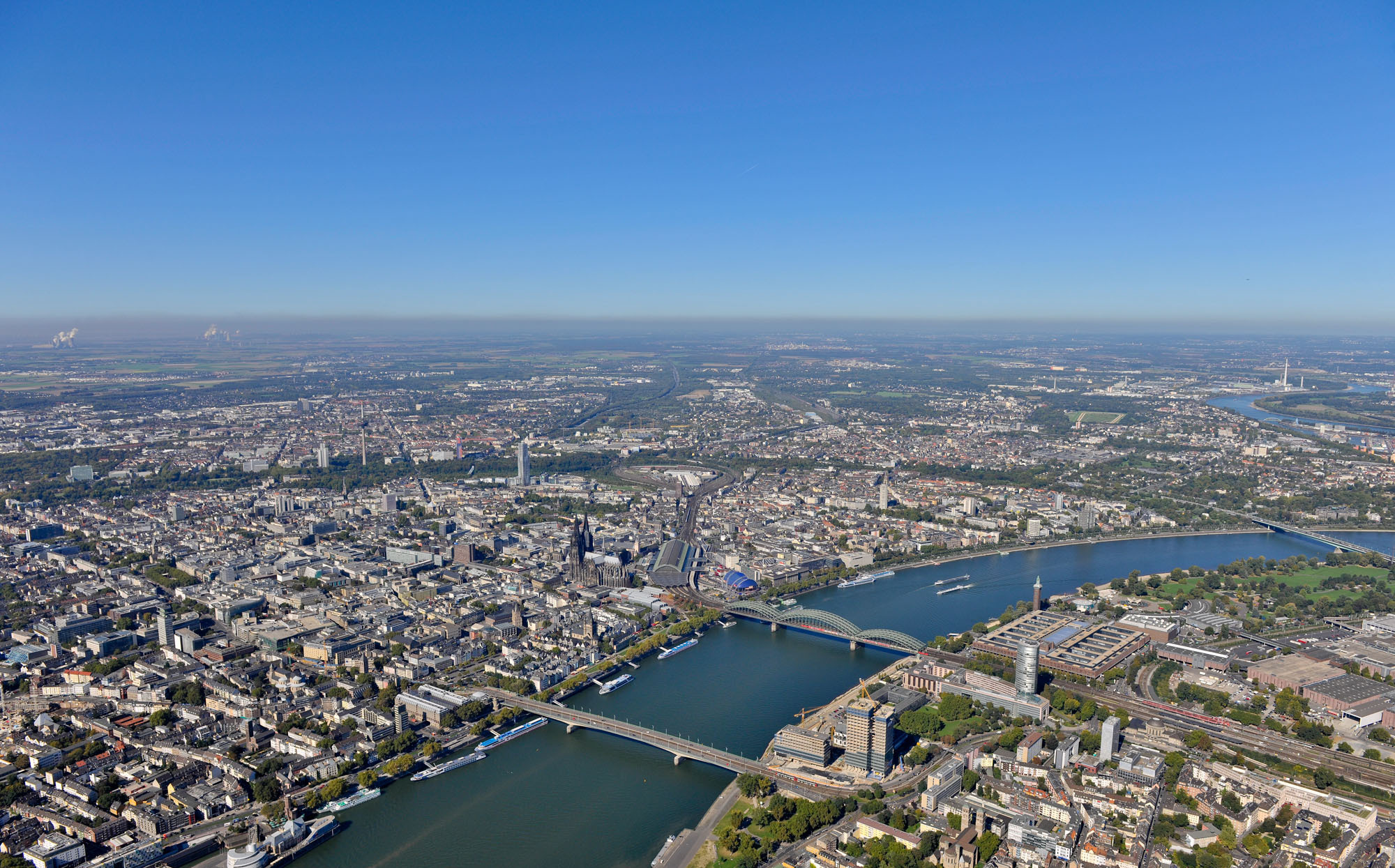 Luftbild aus eine Gyrocopter im Sommer 2012 der Kölner Altstadt. Über den Rhein gehen Deutzer Brücke und Hohenzollernbrücke. Man erkennt die ganze Innenstadt zwischen Rhein und Ring (grünes Band). Unten rechts der Stadtteil Deutz. Gut sichtbar in der Bildmitte der Dom und Hauptbahnhof.